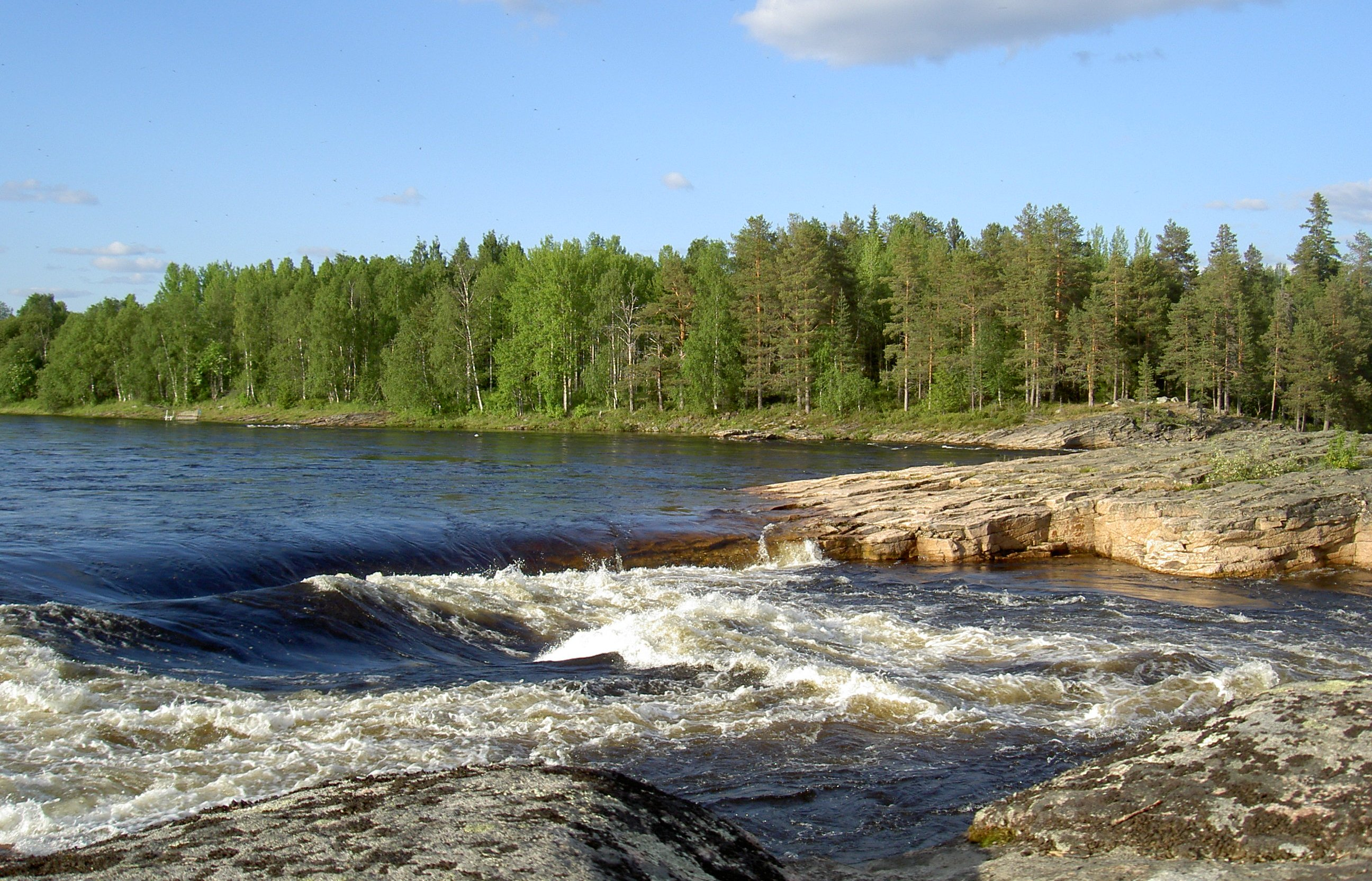 Kattilakoski i Torne älv